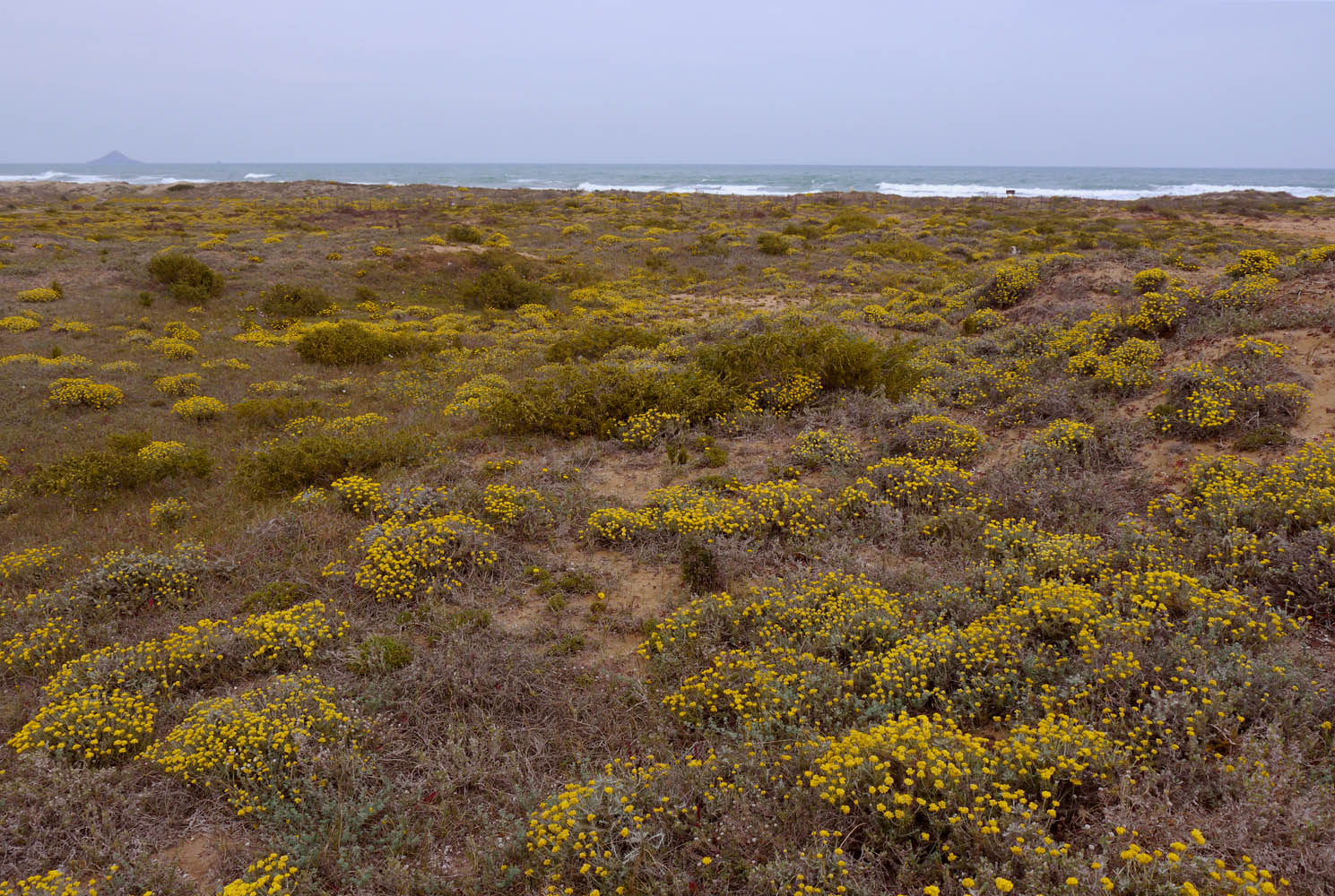 Helichrysum stoechas en las dunas de la playa de las Amoladeras, La Manga del Mar Menor, Cartagena, España.